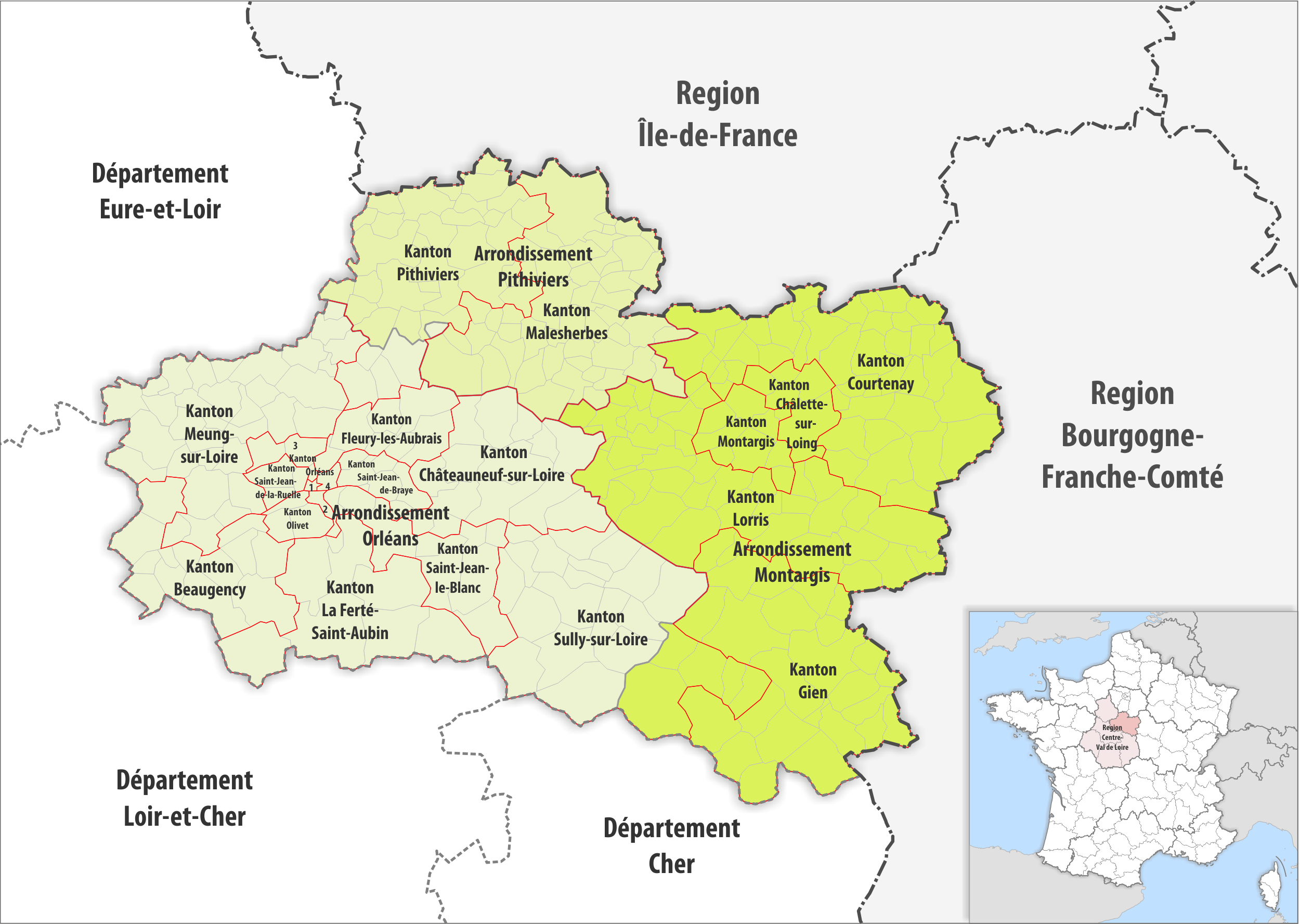 Gemeinden, Kantone und Arrondissemente im Departement Loiret